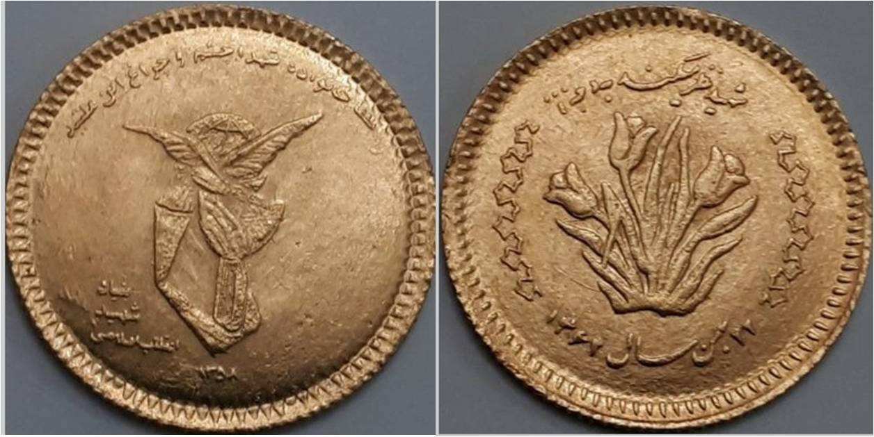 سکه یادبود بنیاد شهید که به سفارش این بنیاد تهیه و به خانواده شهدا اهدا شد. 22 بهمن 1362